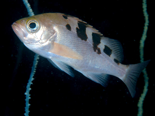 トゴットメバル Sebastes joyneri